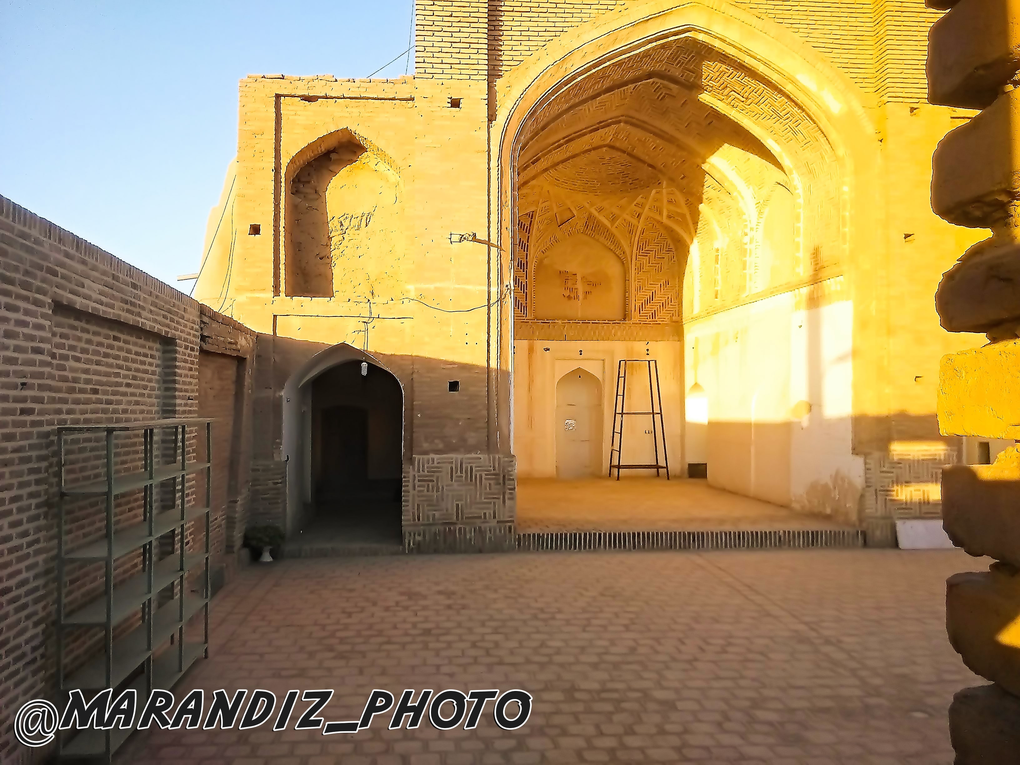 مسجد جامع مرندیز